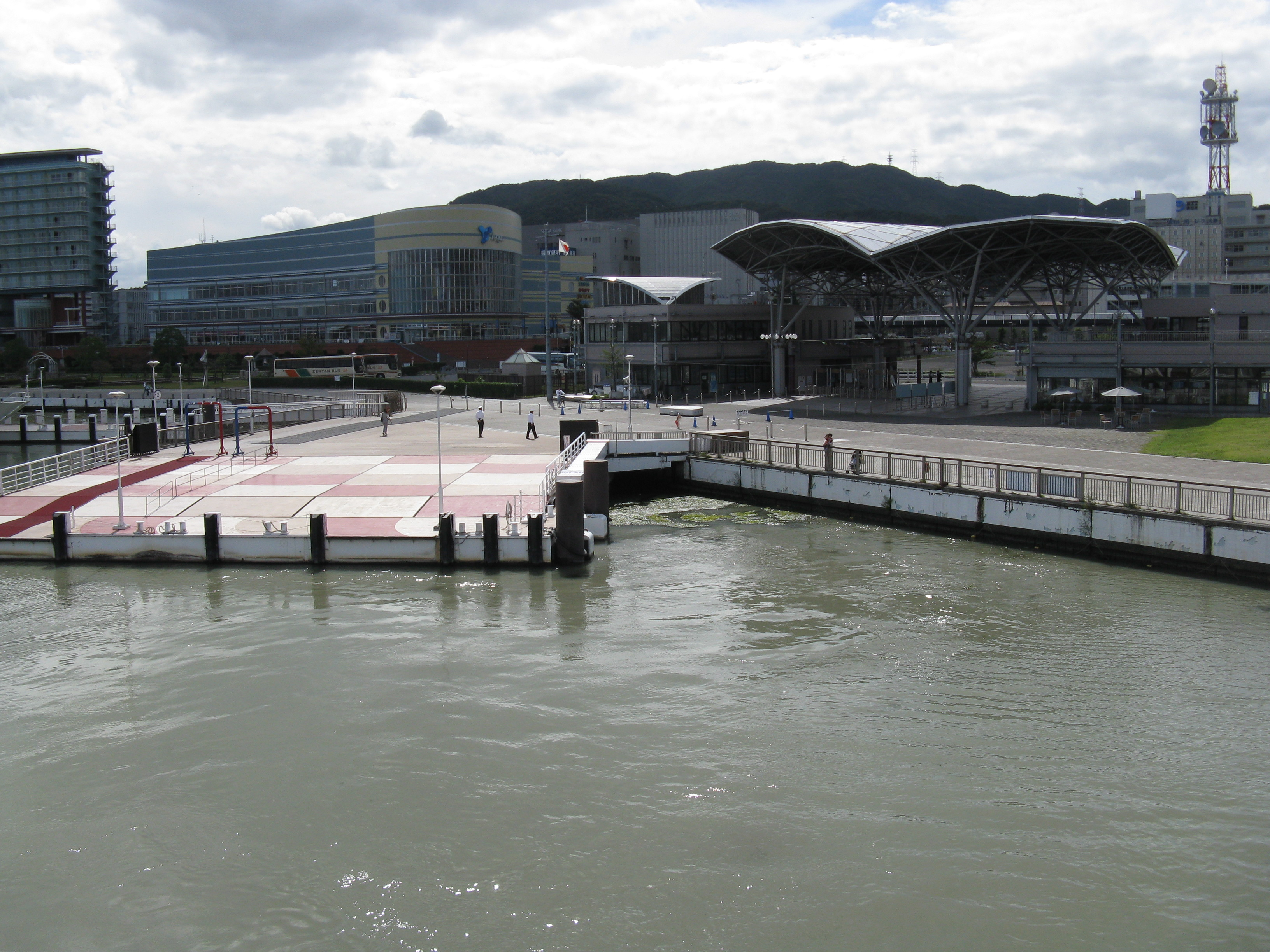 大津港